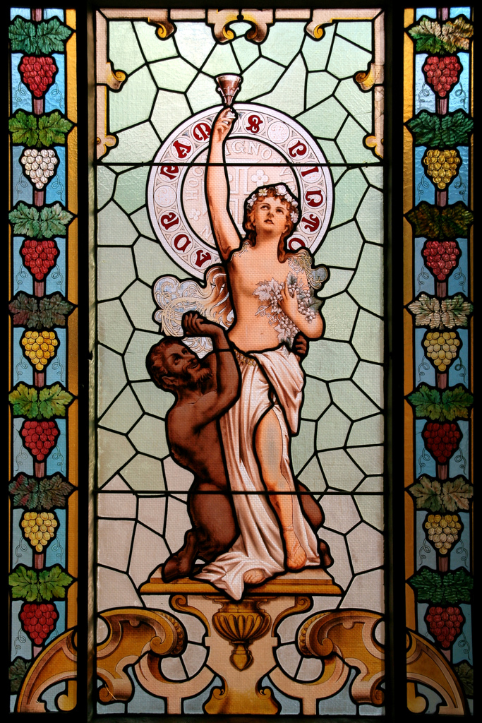 Ce vitrail a été initialement conçu, en 1899, par l'architecte portugais Marques da Silva pour Picard et Cie à Paris